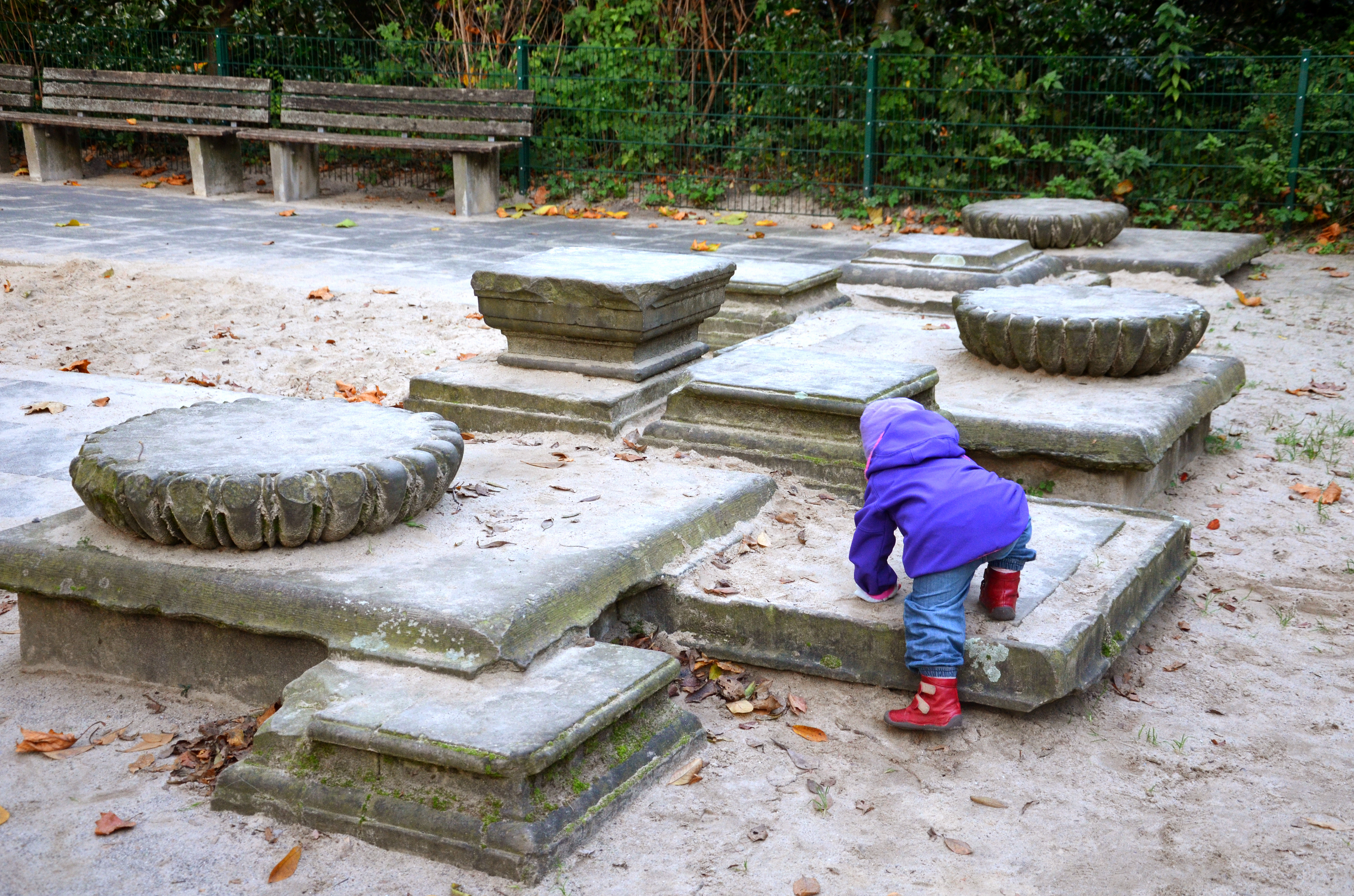 Aus Sandstein gehauene barocke Architekturteile des ehemaligen Lindener Schlosses wurden auf den Spielplatzen im Von-Alten-Garten installiert und dienen - wie hier zu sehen - zum Beispiel unseren Kindern zu ersten Kletterversuchen ...